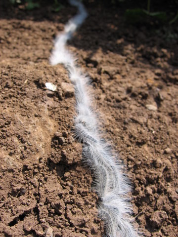 Thaumetopoea solitaria, שיירה של תהלוכן האלה